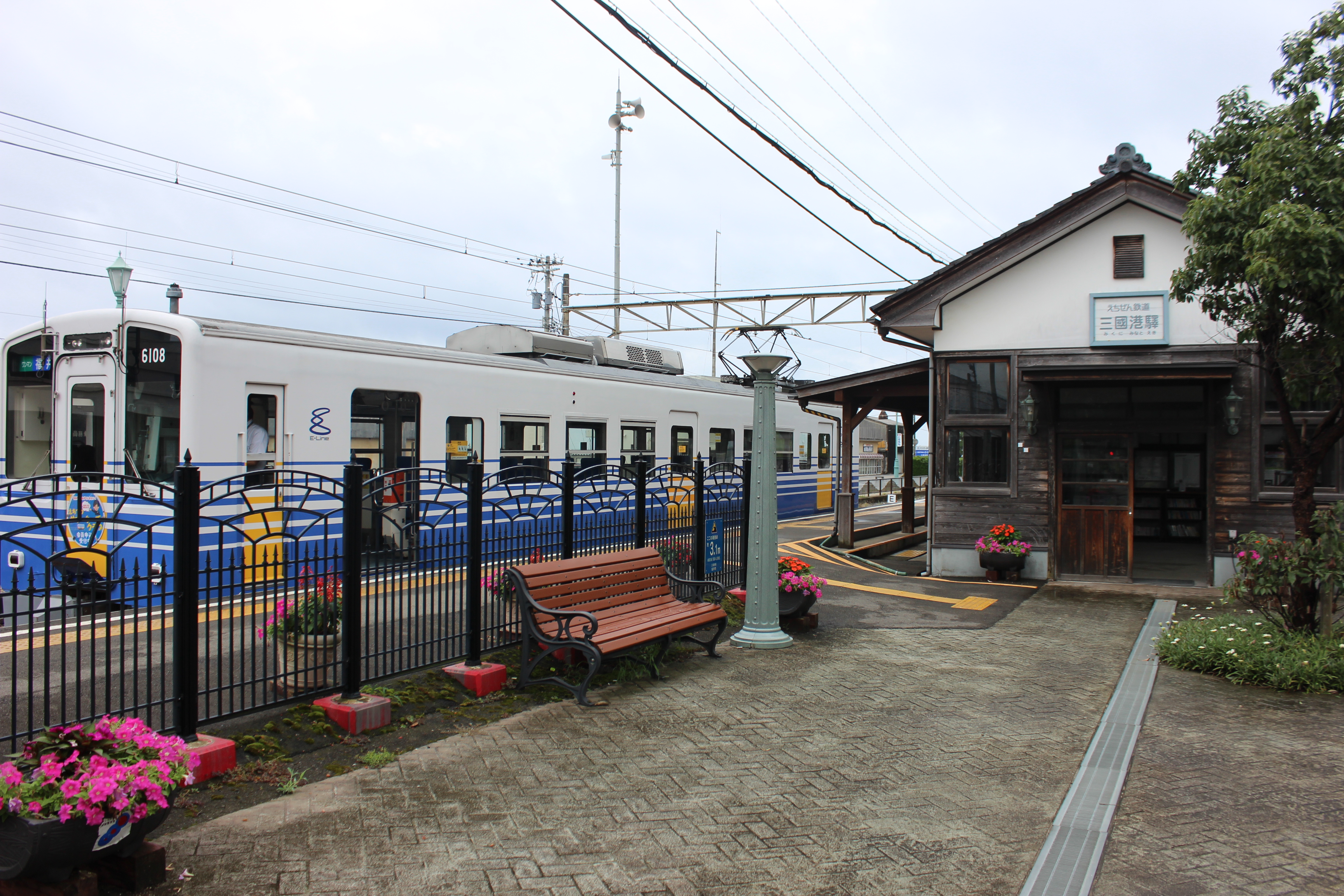 えちぜん鉄道三国芦原線三国港駅